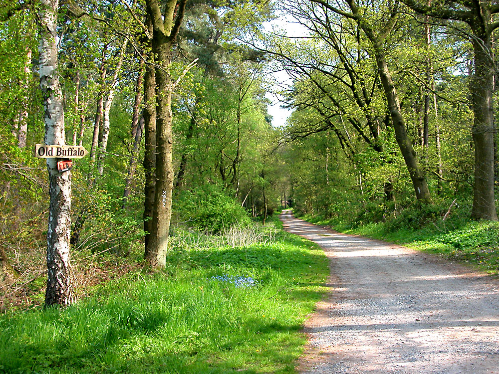 Wald «Große Heide». Dorsten-Rhade. Nord.